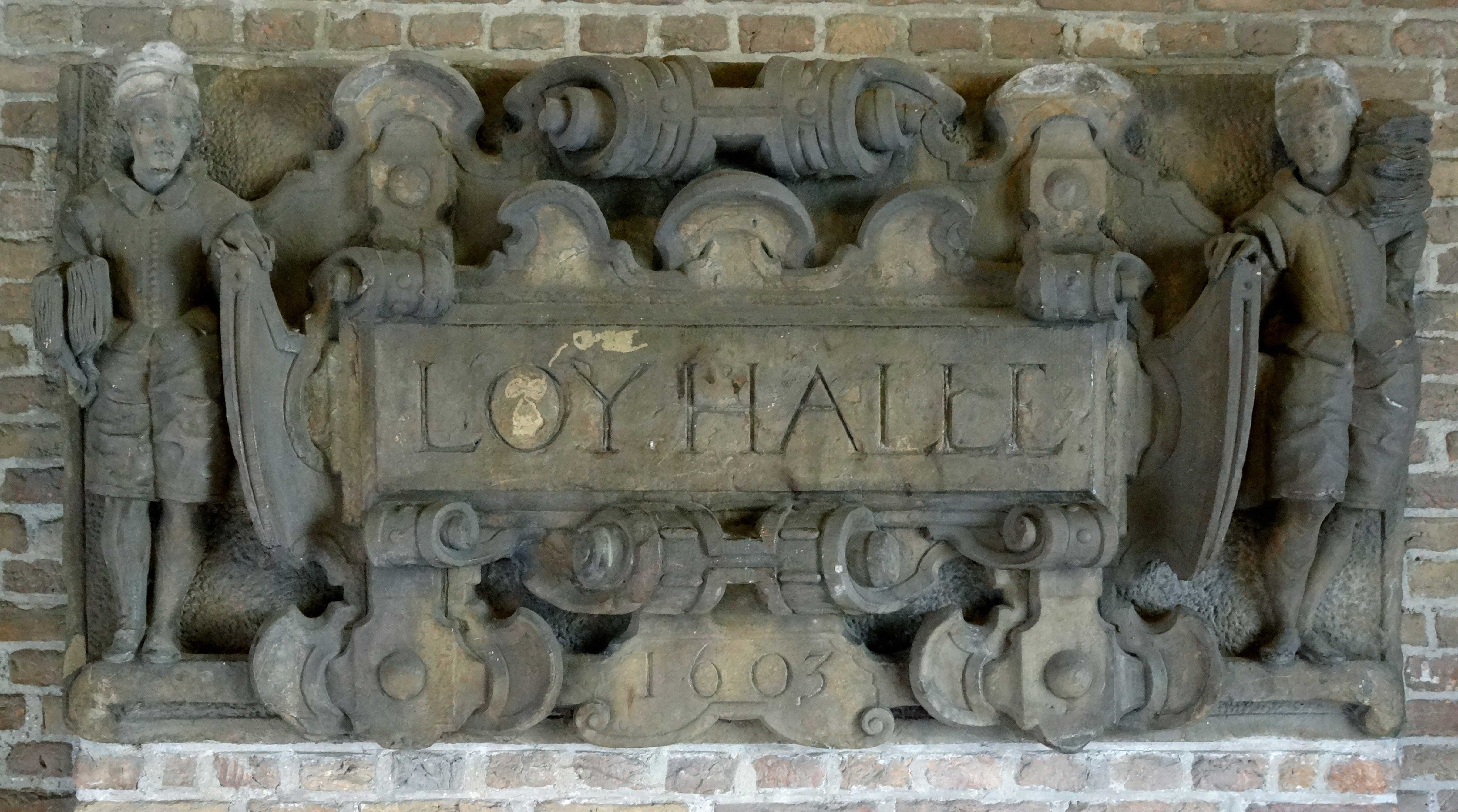 Gevelreliëf Loyhalle uit 1603 - Catharijnatuin Achter de Kerk Gouda